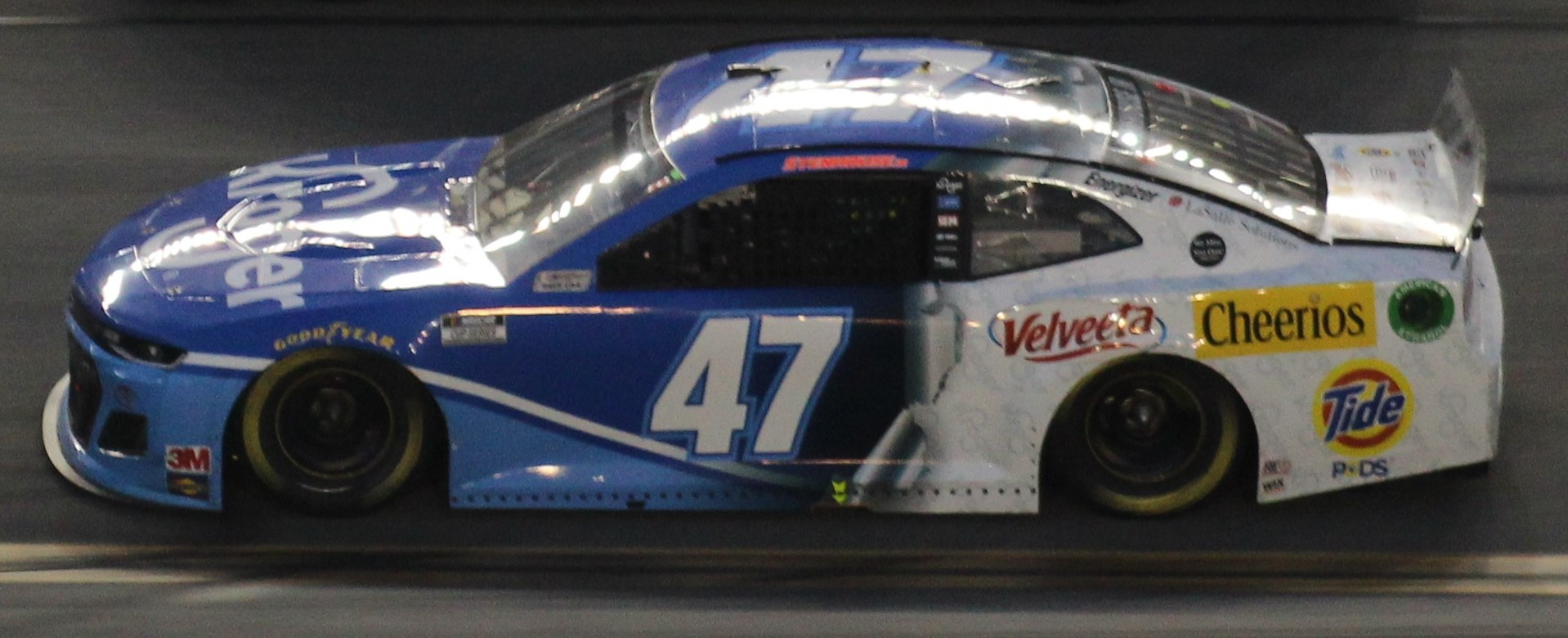 Daytona Speekweeks, 2020